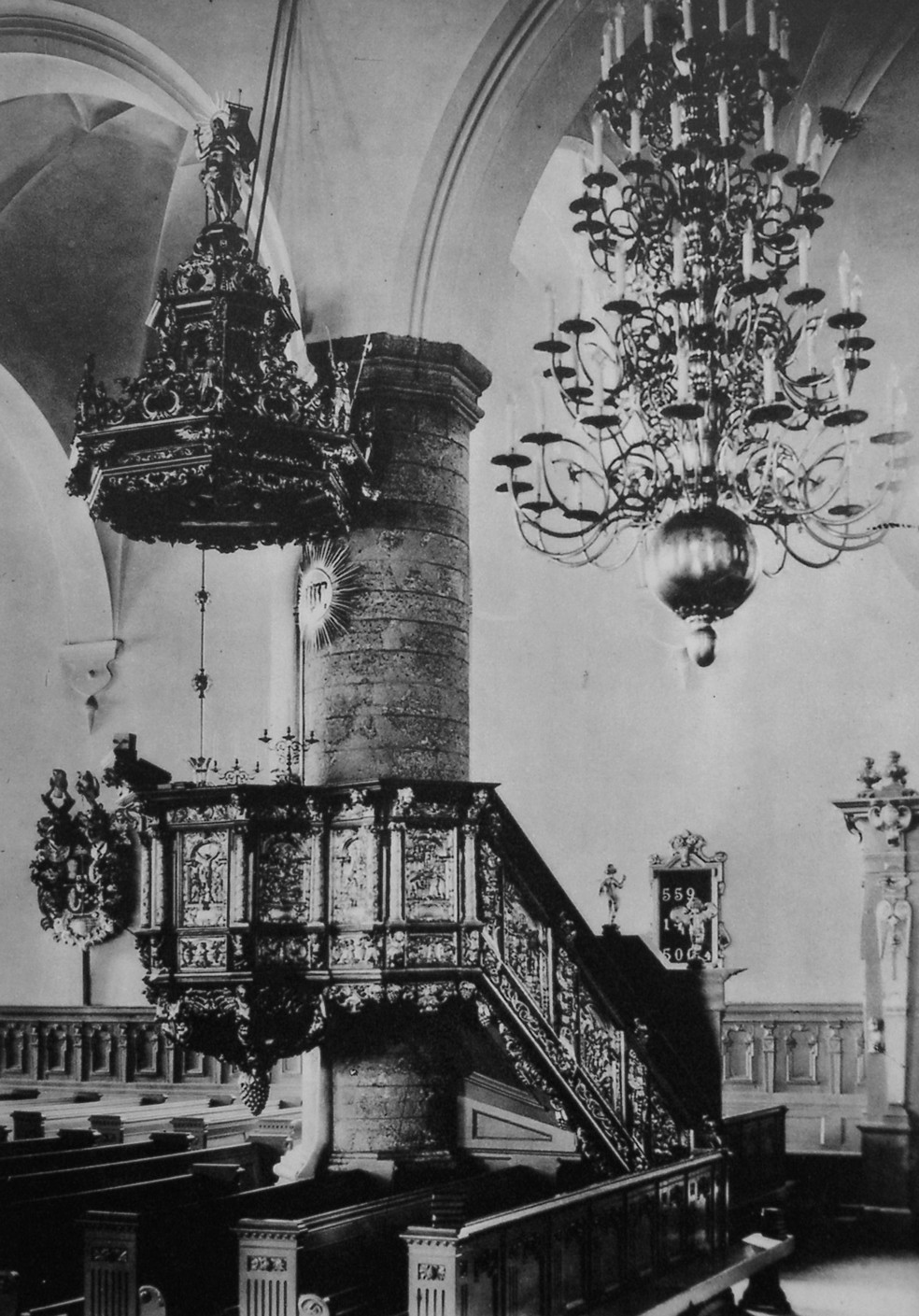 Prdediktstolen i Kristine Kyrka, Falun, skapad av Edwardt Friis ca 1655